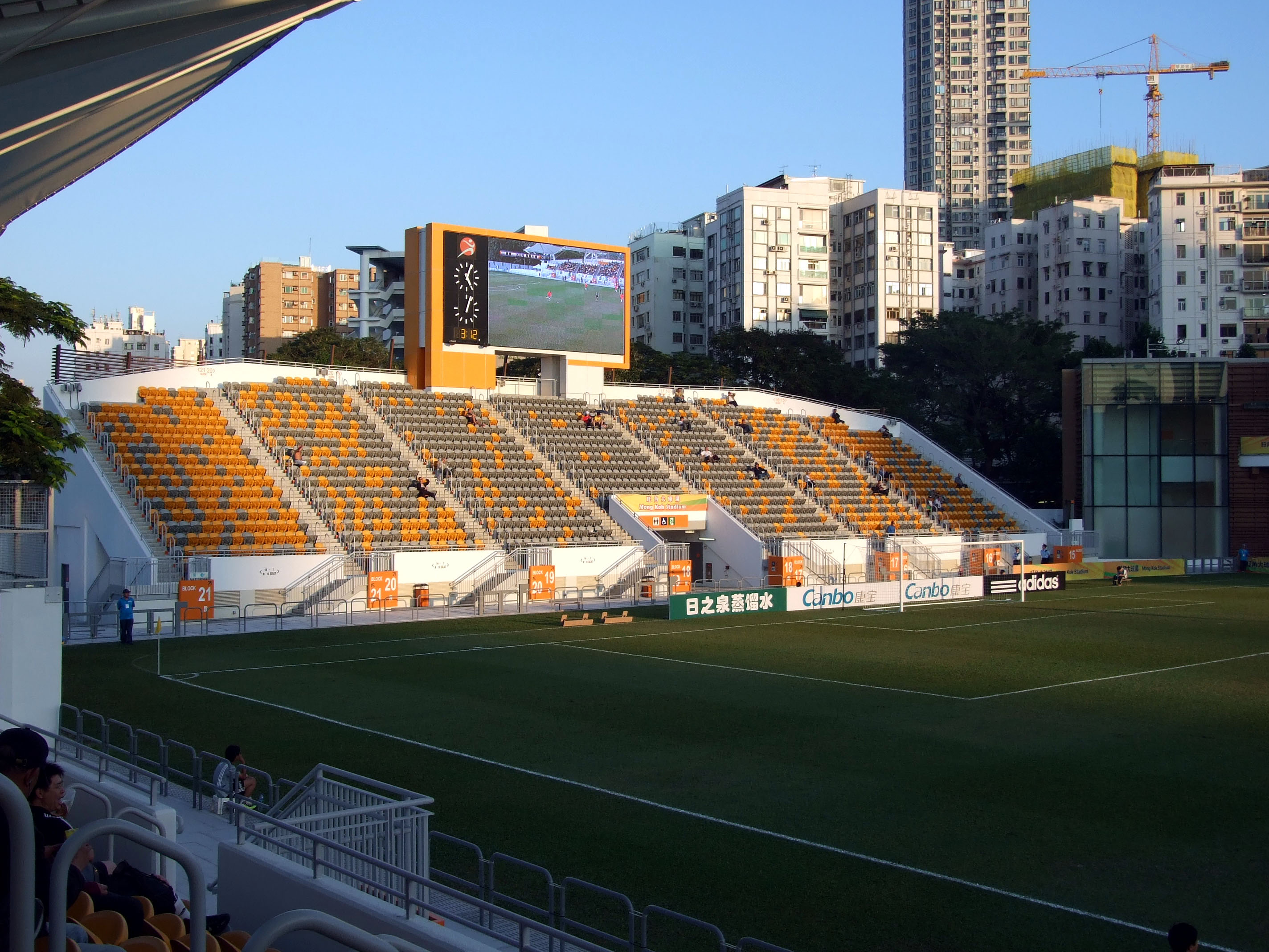 中文（香港）: 旺角大球場近火車看台及彩色顯示電子計分屏幕